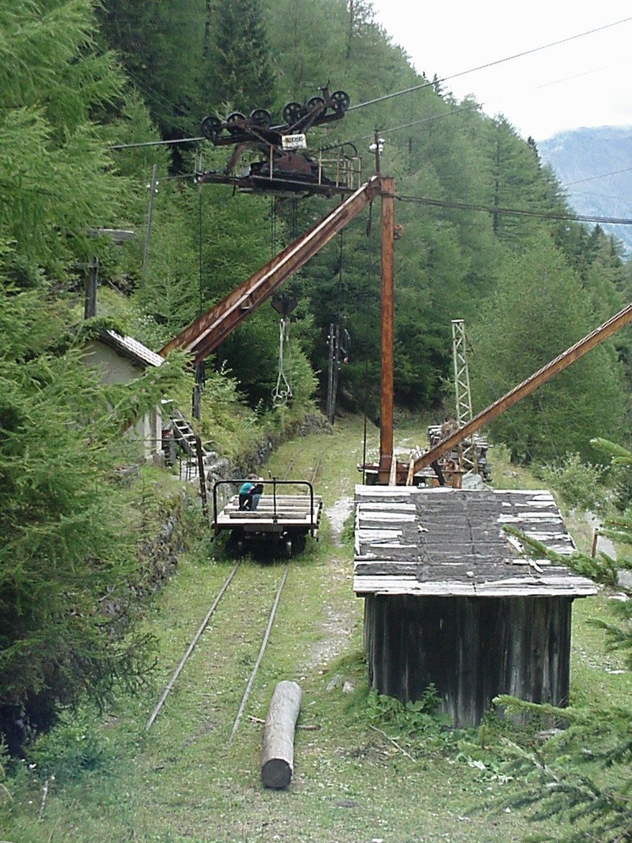 Laaser Marmorbahn: Verladestelle mit Kabelkran